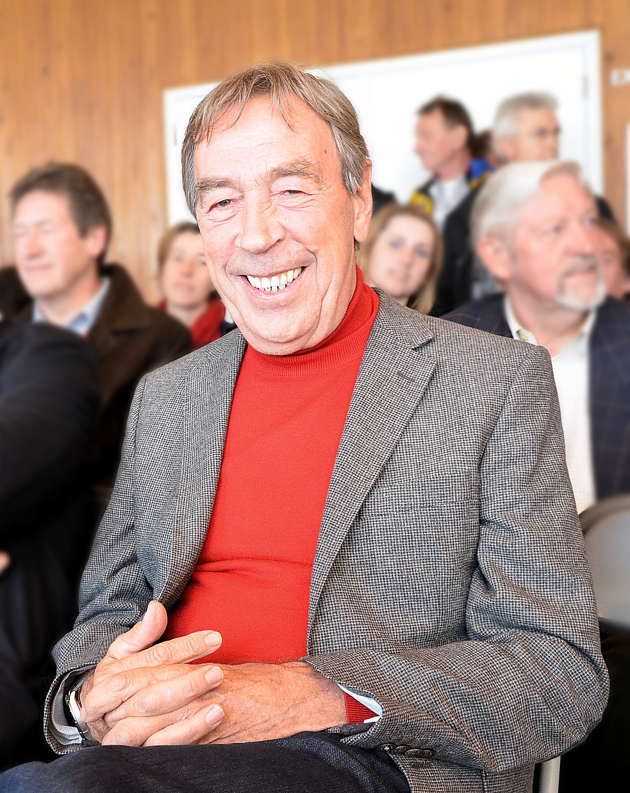 Op dinsdag 9 april 2013 werd het belevingsparcours 'In het Wiel van Eddy Merckx' officieel geopend in het Sportimonium (gelegen op het Blosodomein van Hofstade-Zemst). De aanwezigheid van Herman Van Springel werd erg gesmaakt. Hij werd tweede in de tour van 1968, het jaar voor Eddy Merckx zijn eerste tour won.